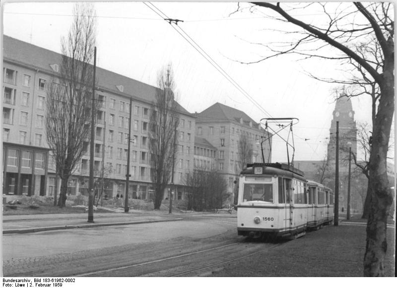 Dresden, Dr.-Külz-Ring, Wohnblocks, Straßenbahn Zentralbild Löwe 2.2.1959 Zum 14. Jahrestag der Zerstörung der Elebestadt (13.Februar) - Wiederaufbau der Innenstadt Dresdens. Das im Zentrum der Stadt gelegene Gebiet zwischen der Freiberger- und der Ammonstrasse wurde am 1. November 1956 der FDJ als "Bau der Jugend" übergeben. Die jungen Bauarbeiter haben sich für dieses Jahr das Ziel gesetzt, in Großblockbauweise 525 Wohnungseinheiten montagefertig herzustellen. UBz: Neue Wohnhäuser mit Geschäften am Dr.-Külz-Ring, die kürzlich fertiggestellt worden sind. Im Hintergrund der Turm des Rathauses.